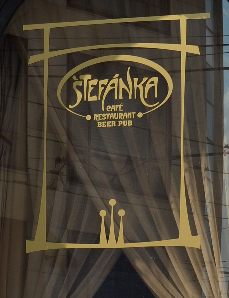 Logo kaviarne na okne